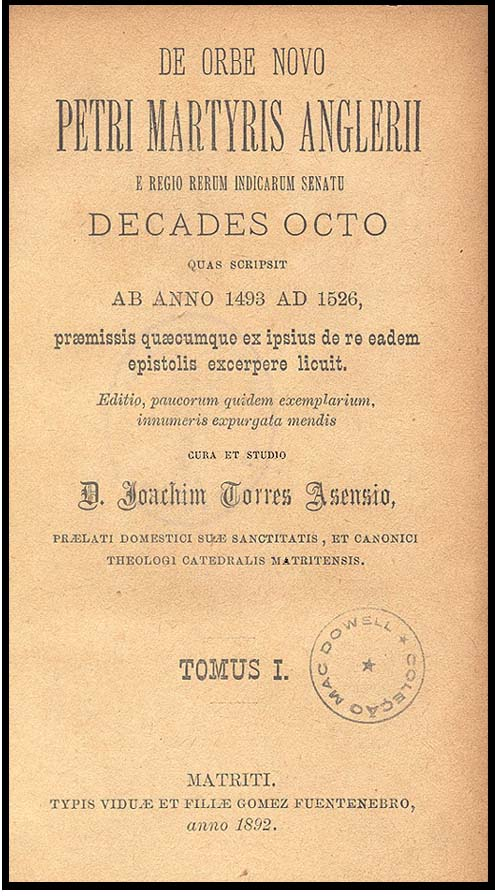 Frontispício de uma edição de 1892 do livro De Orbe Novo, publicado pela primeira vez em 1516 pelo historiador e médico italiano Pietro Martire d’Anghiera